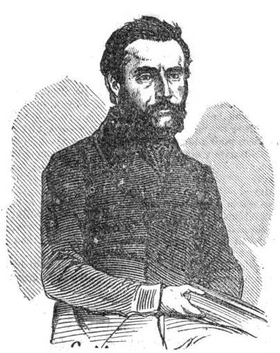 Ribeyrolles